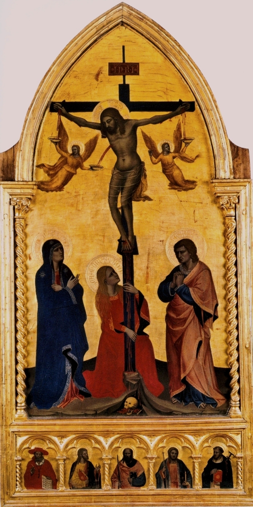 Crucifixion